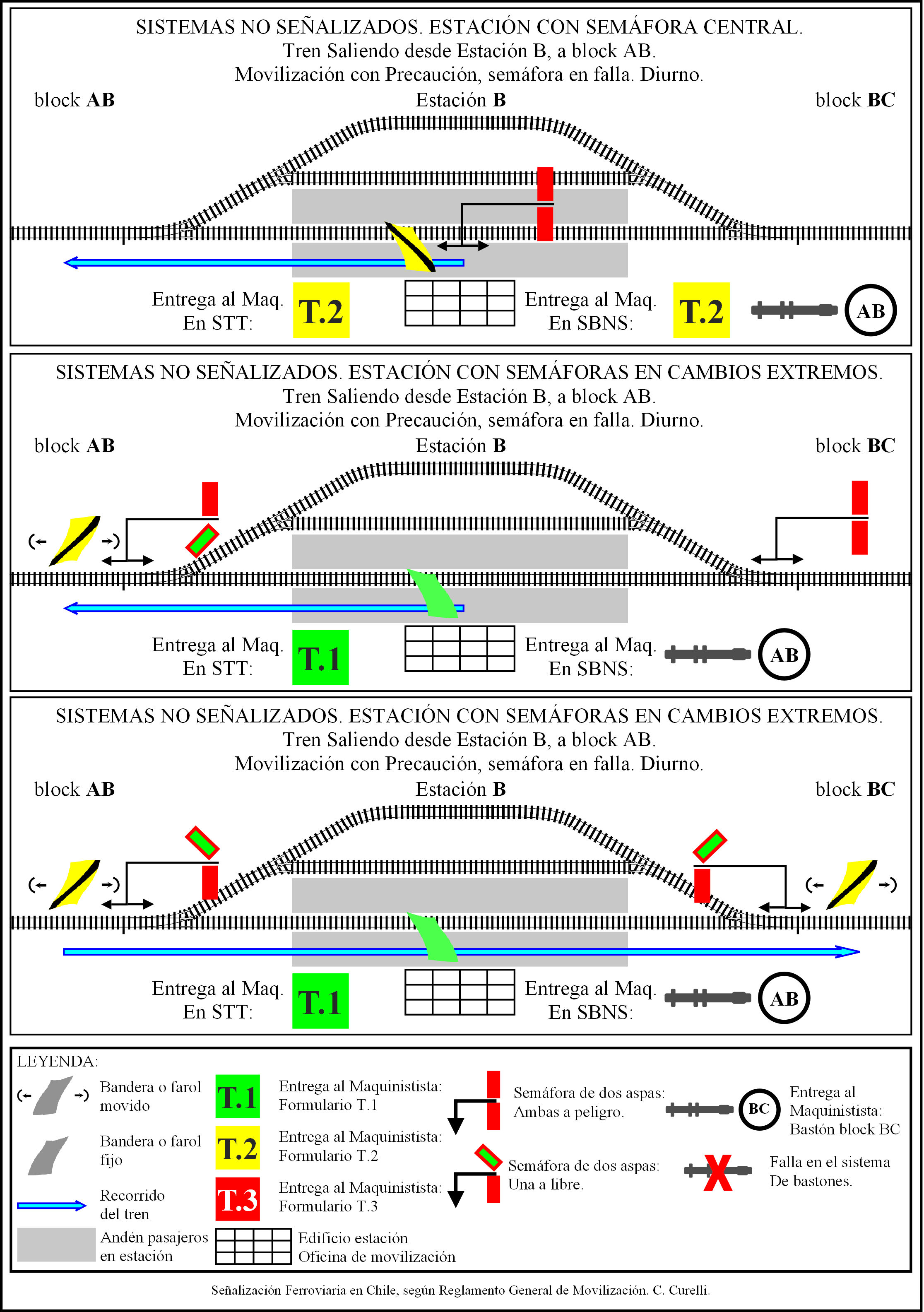 Esquema operaciones estaciones no señalizadas con dos semáforas en los cambios extremos. Reglamento General de Movilización. Ferrocarriles del Estado (Chile).